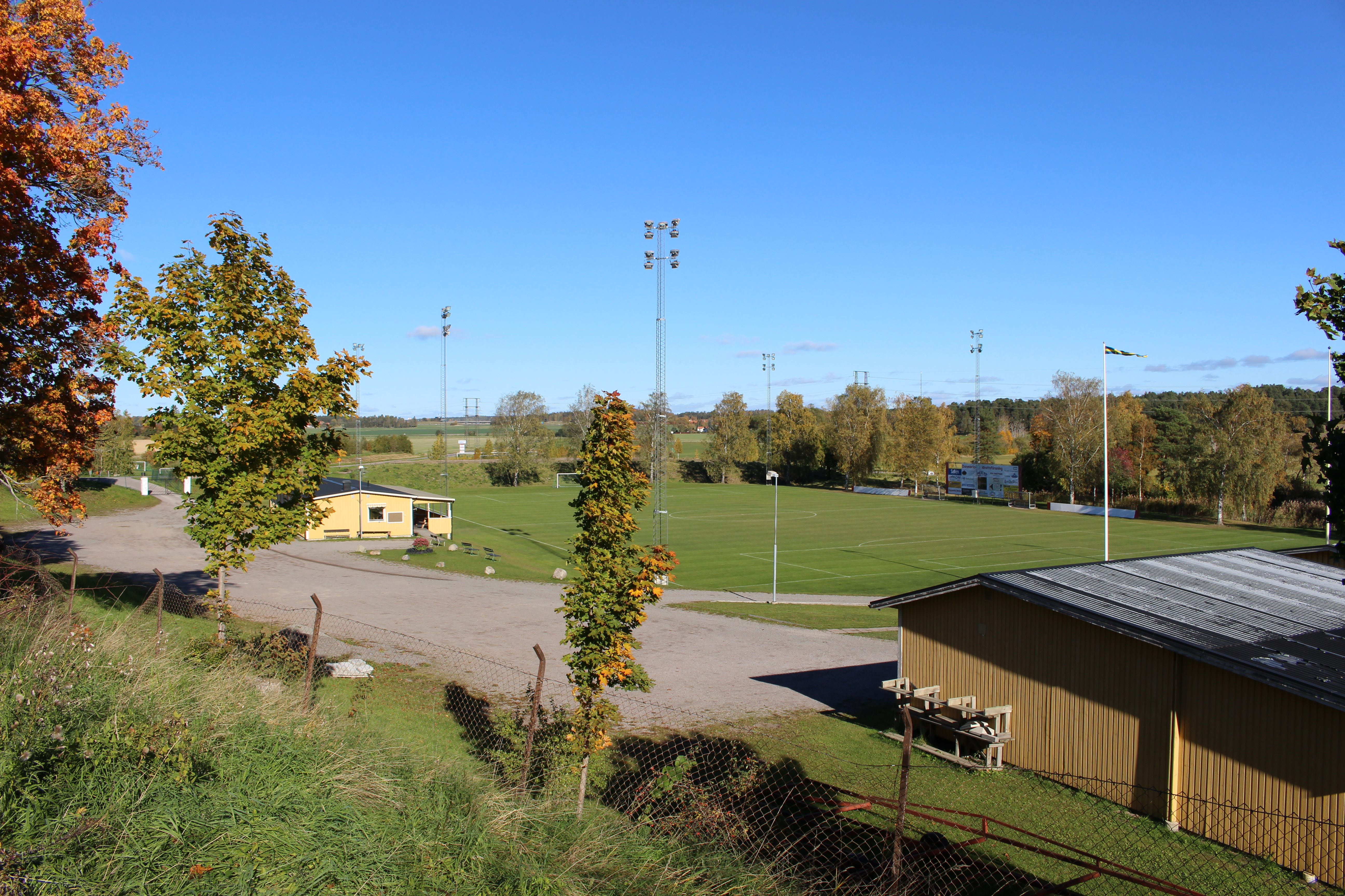 Fotbollsplanen för Danelids IP.